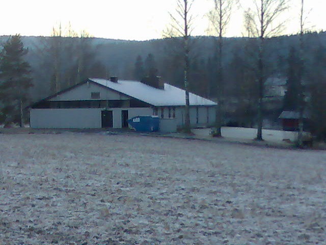 Kloakkrenseanlegg i Nord-Odal